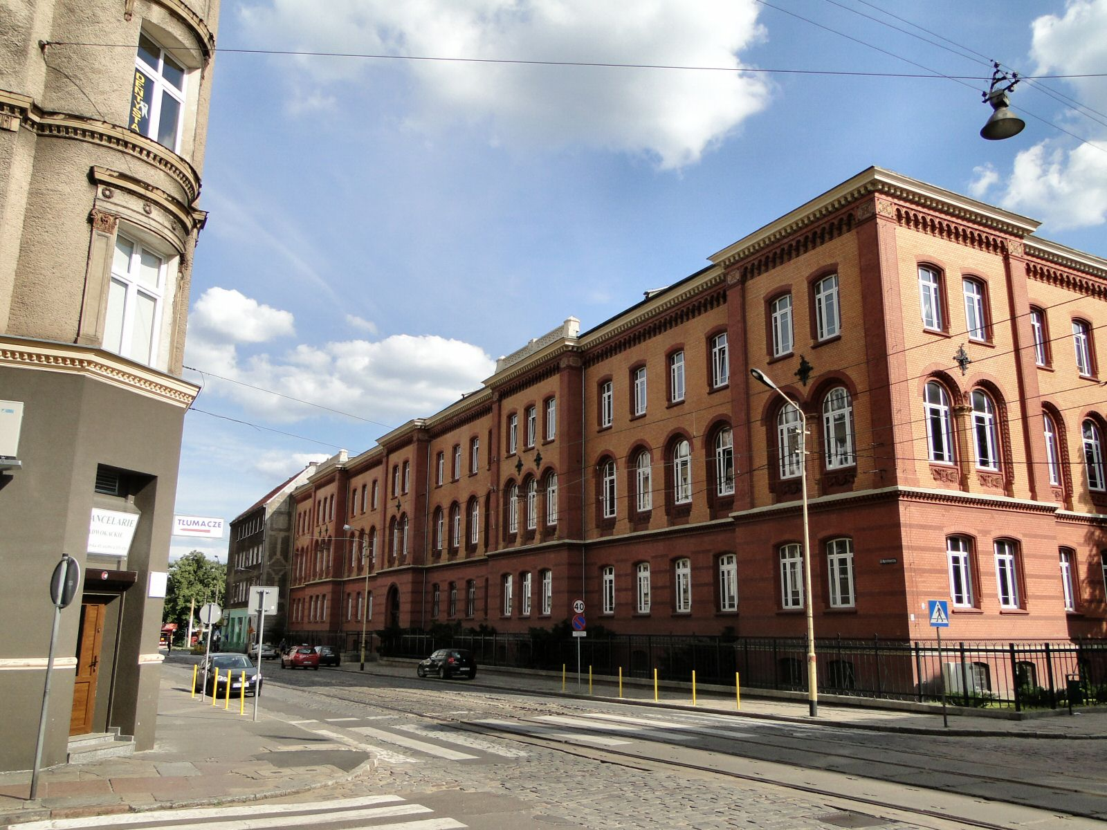 Szczecin - narożny Gmach Sądu Rejonowego przy ulicach Kaszubskiej 42 i Narutowicza 20-21 (zabytek nr rejestr. 30)